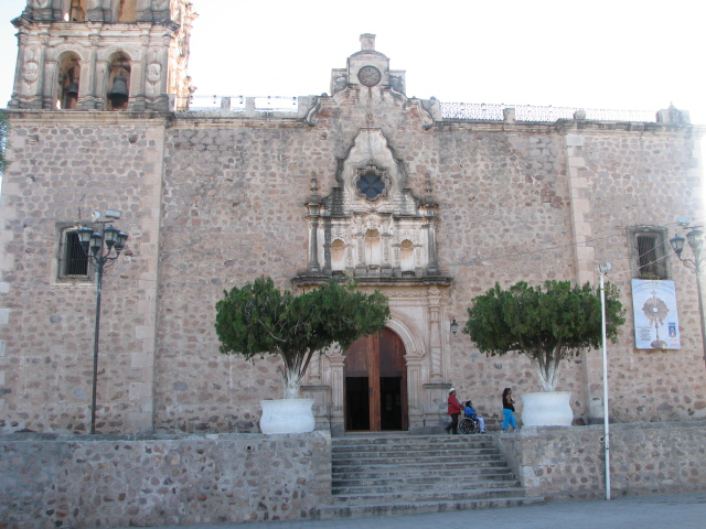 Templo de Nuestra Señora de la Purísima Concepción — de Álamos, estado de Sonora, México.